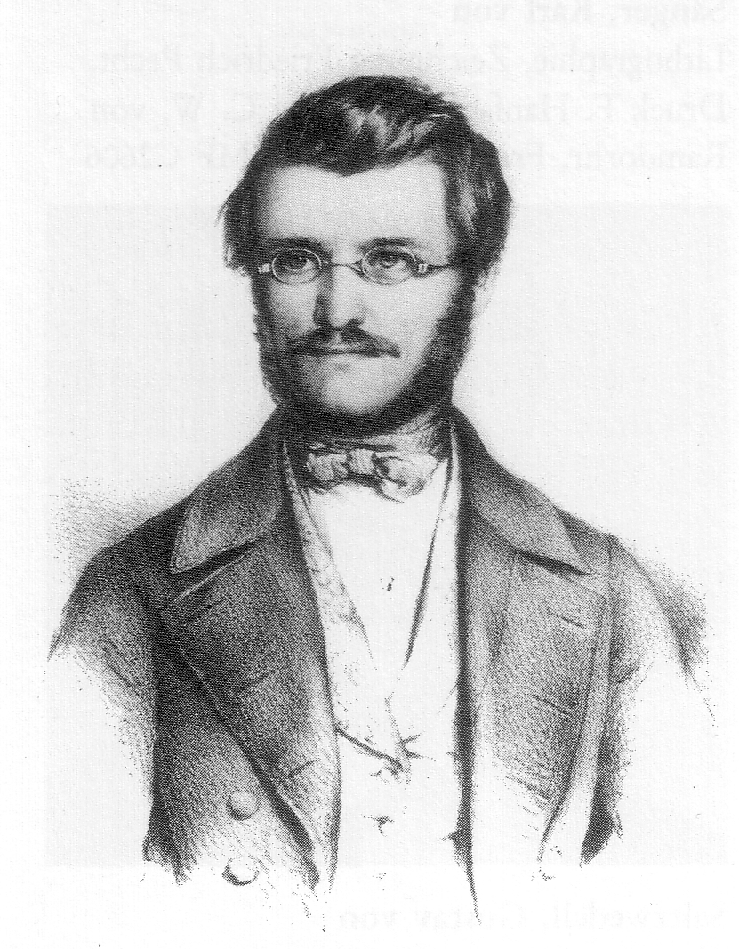 Max Joseph Ruhwandl (1806-1890), Abgeordneter der Paulskirche